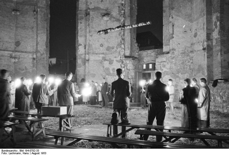 CVJM Kassel. Nächtlicher Gottesdienst in zerstörter Kirche